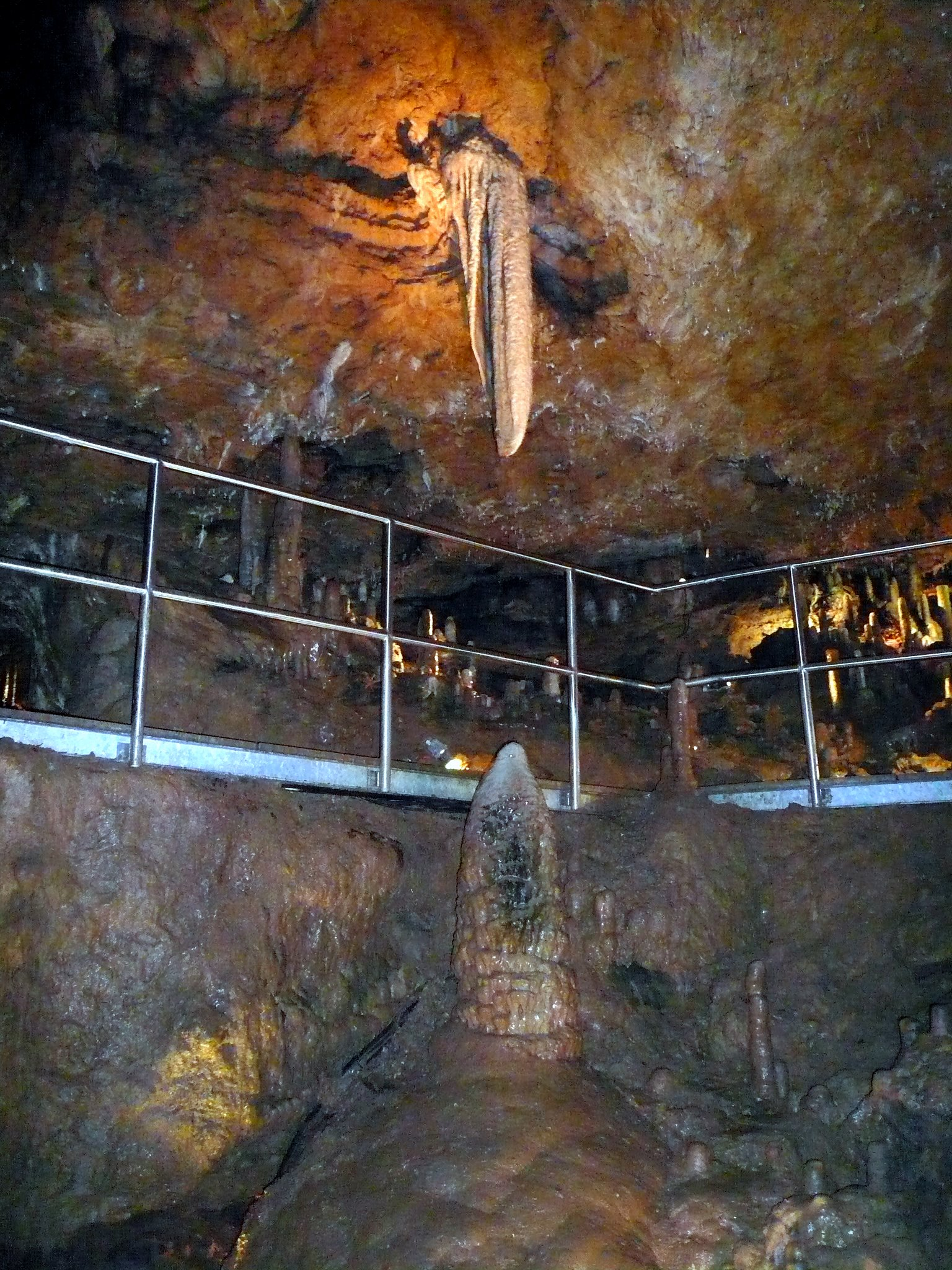 Sophienhöhle, Elefantenohr und Bienenkorb